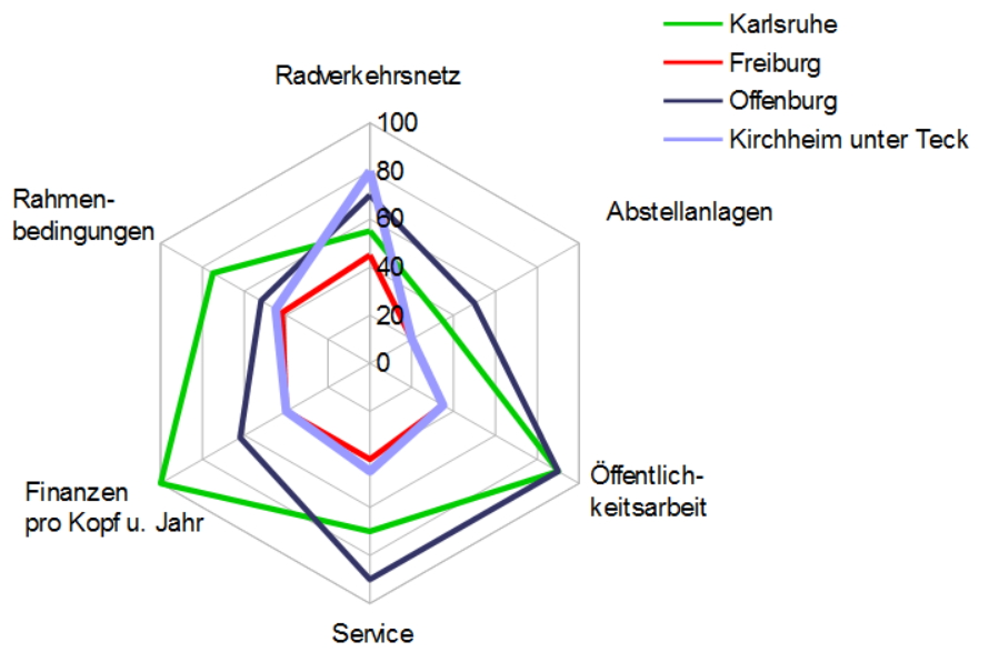 Radverkehrs-Politik